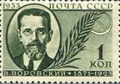 Вацлав Вацлавович Воровский (1871-1923) — российский революционер, дипломат